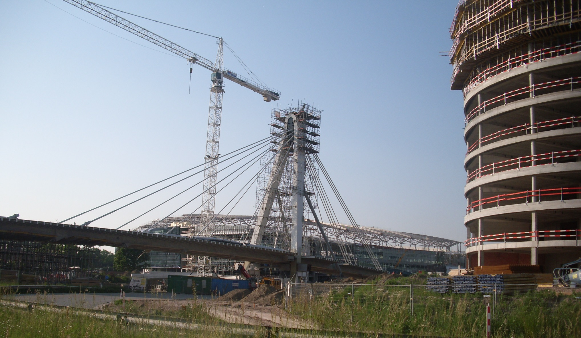 De Ghelamco-Arena in opbouw - Gent - Oost-Vlaanderen - België De pijler moet de brug over de Ringvaart helpen dragen.